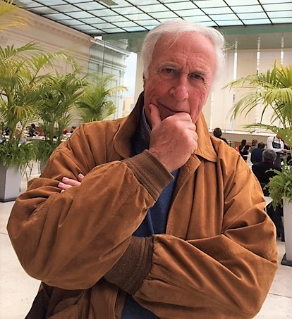 Attilio del Giudice